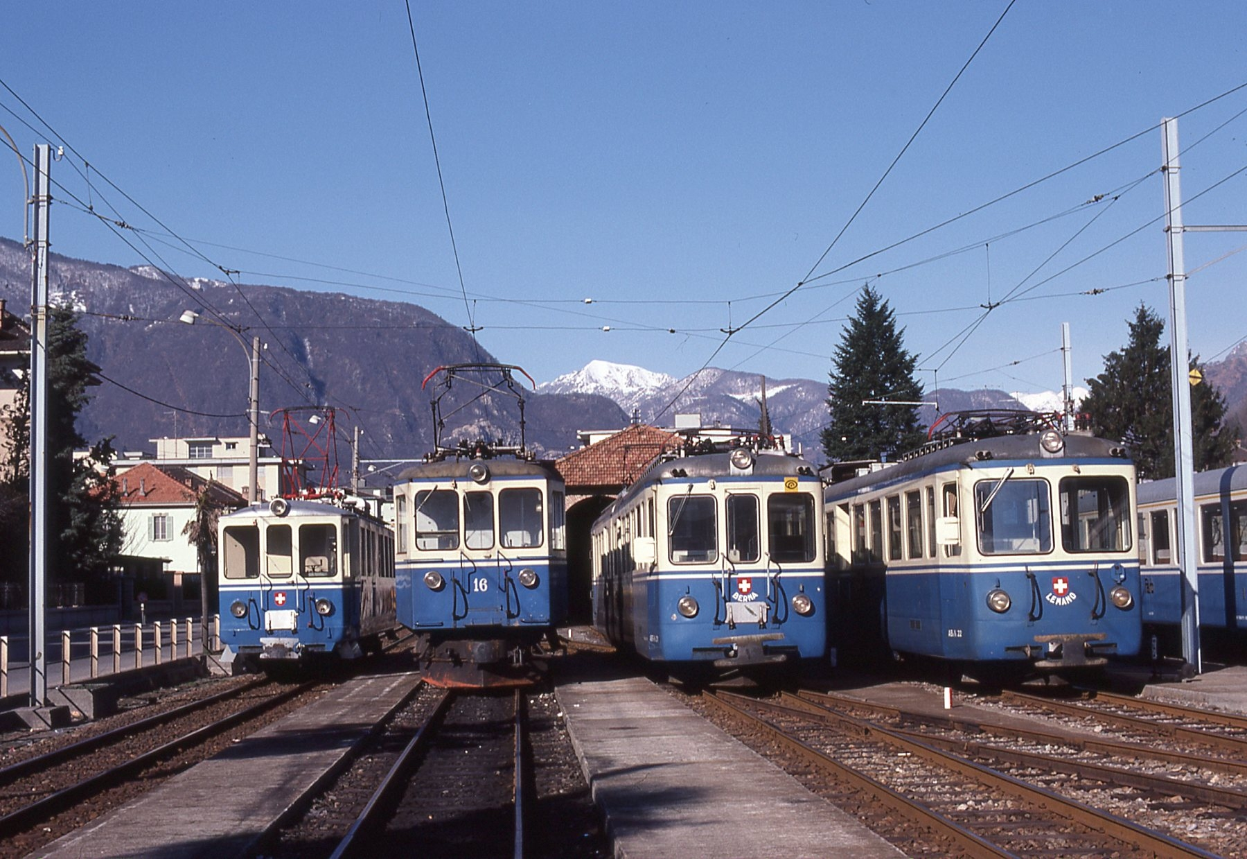 Elettromotrici FART in sosta nel deposito di Locarno Sant'Antonio